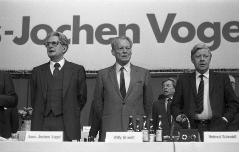 22.1.1983 SPD-Wahlparteitag in der Dortmunder Westfalenhalle